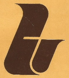 A Textilipari Kutató Intézet (Budapest) emblémája